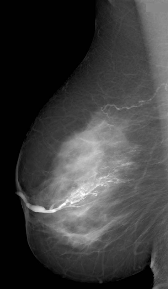 Selektive Galaktographie der Milchgänge eines einzelnen Segments.